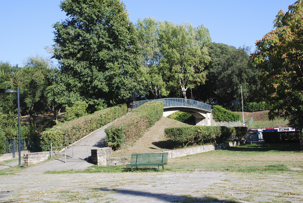 Isolotto (quarter), Florence, Italy. La Montagnola: Bridge.